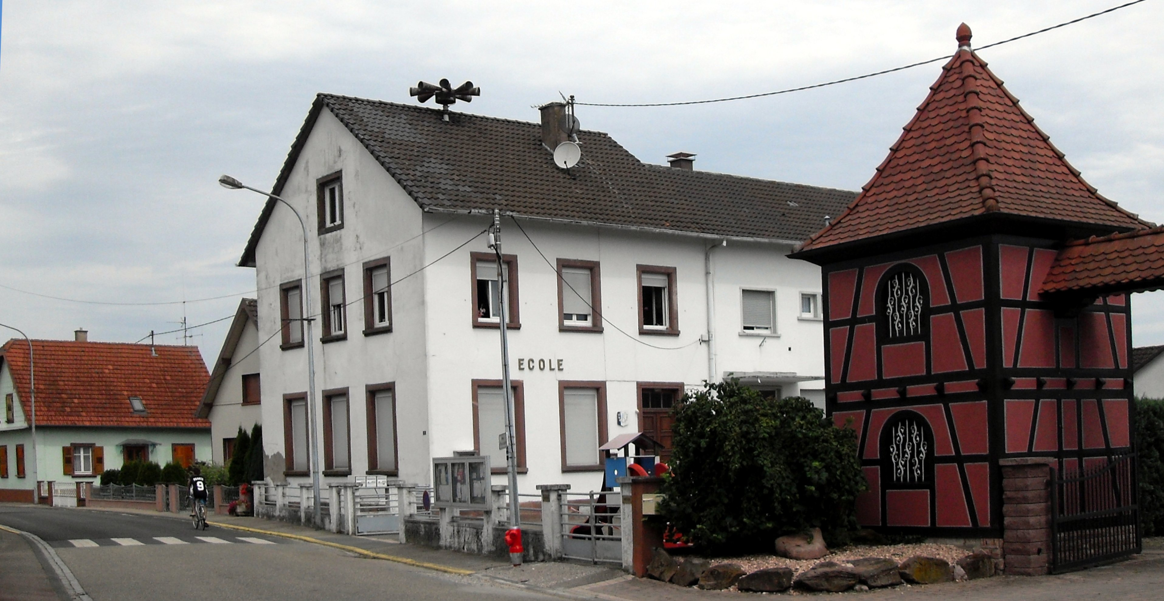 La mairie-école de Neuhaeusel